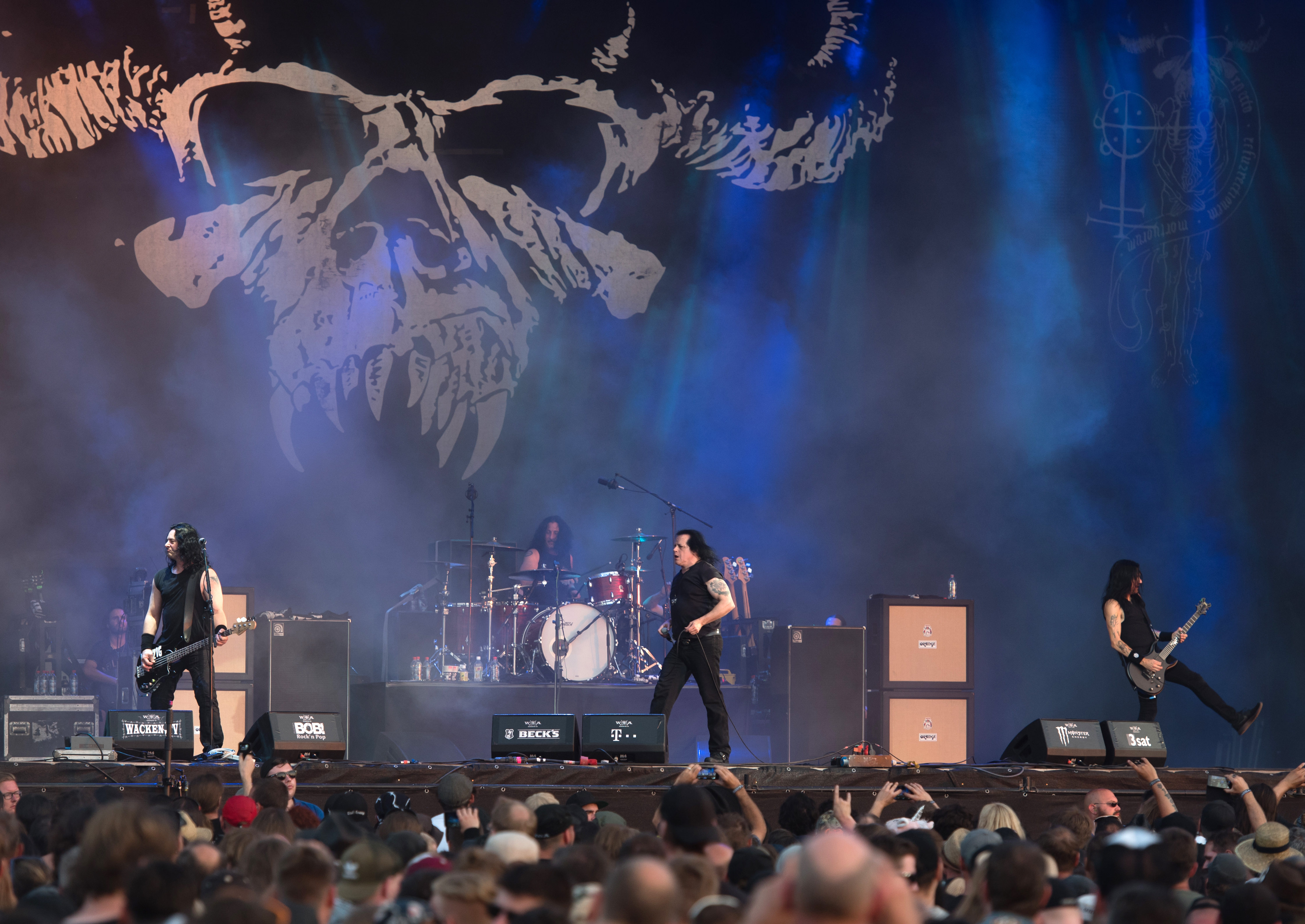 Danzig beim Wacken Open Air 2018